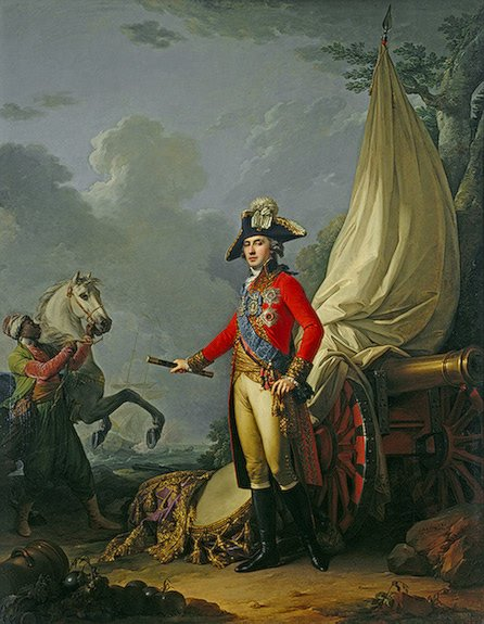 «Иоганн Баптист Лампи Старший Портрет князя Платона Александровича Зубова 1802 (Государственный Эрмитаж, Петербург)»label QS:Lru,"Иоганн Баптист Лампи Старший Портрет князя Платона Александровича Зубова 1802 (Государственный Эрмитаж, Петербург)"